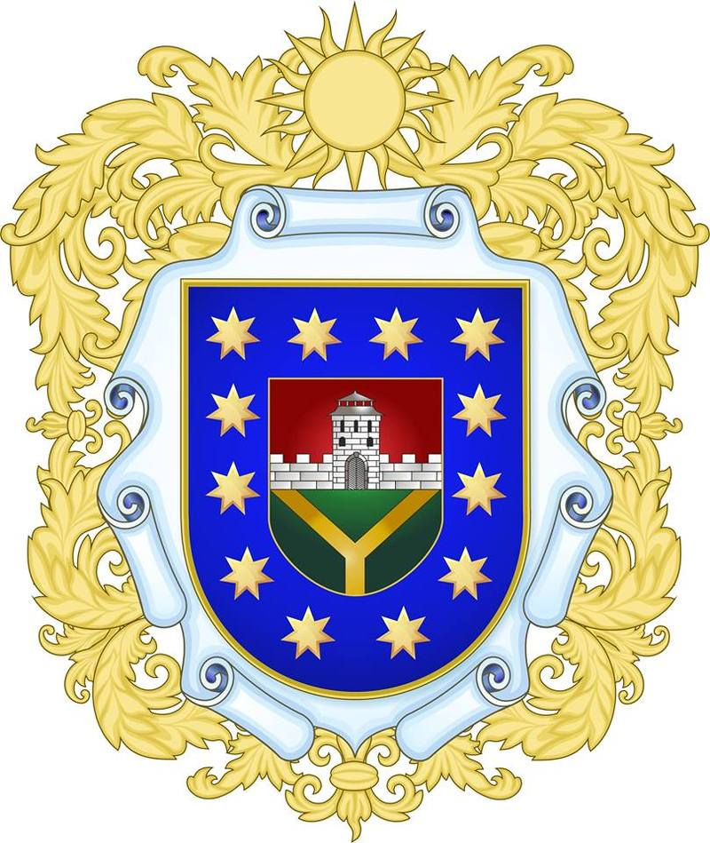 Герб МеджибізькоїОТГ